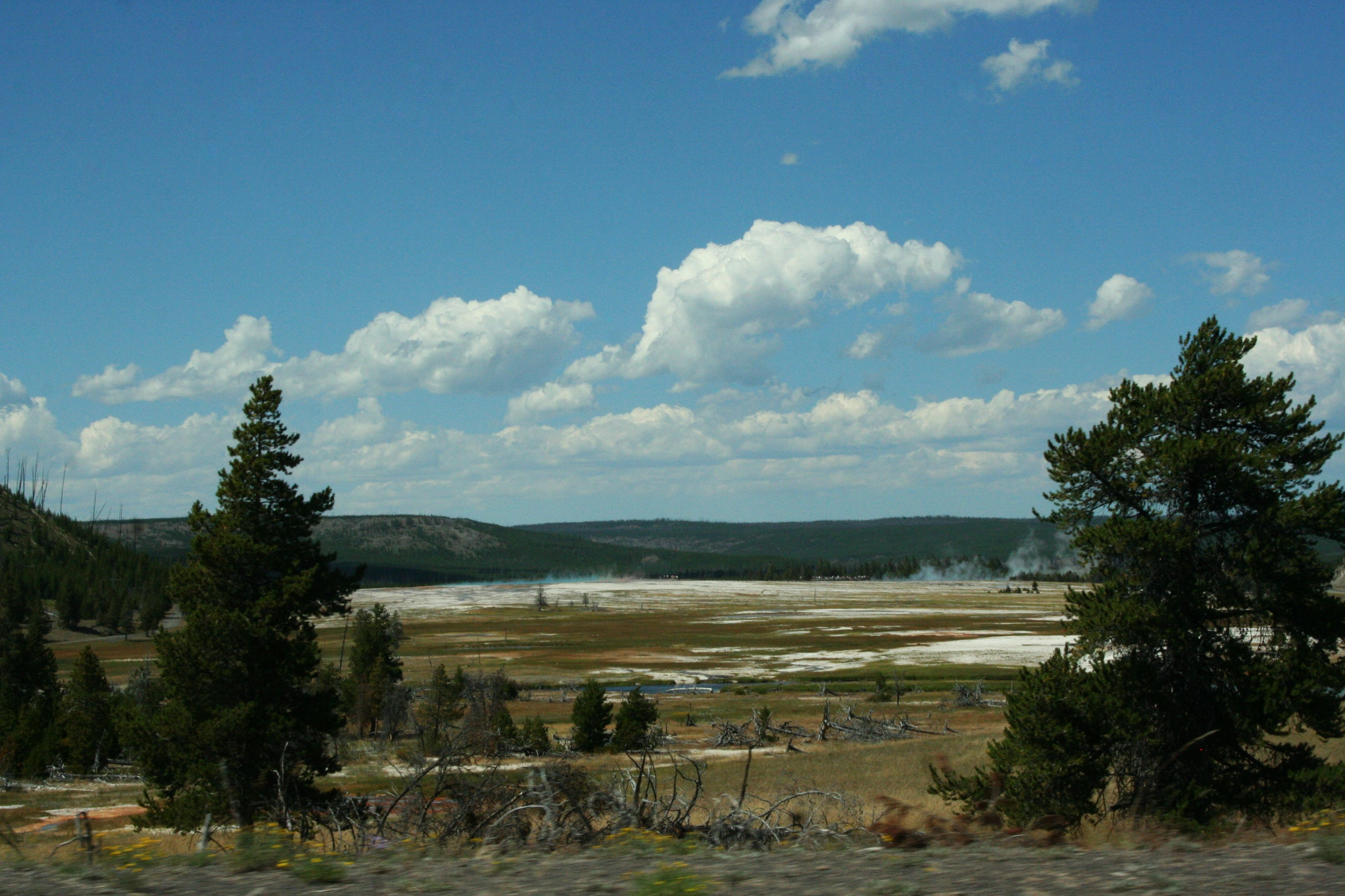 Black Sand Basin Park Narodowy Yellowstone)